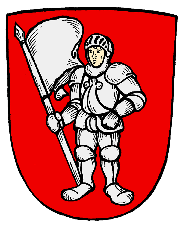 Wappen derer von Cotzhausen